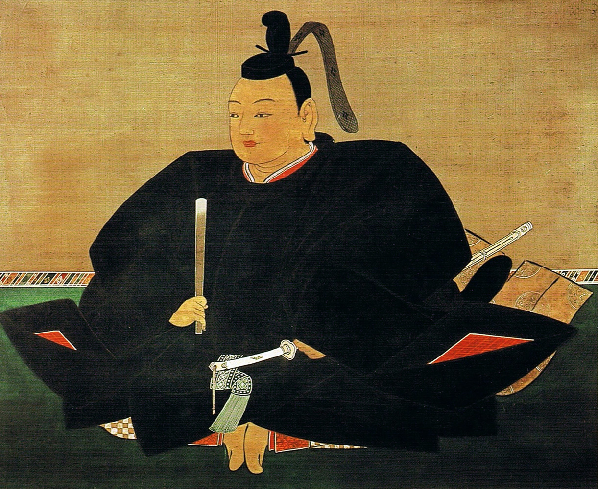 鎌倉幕府二代将軍 源頼家像 京都 建仁寺所蔵